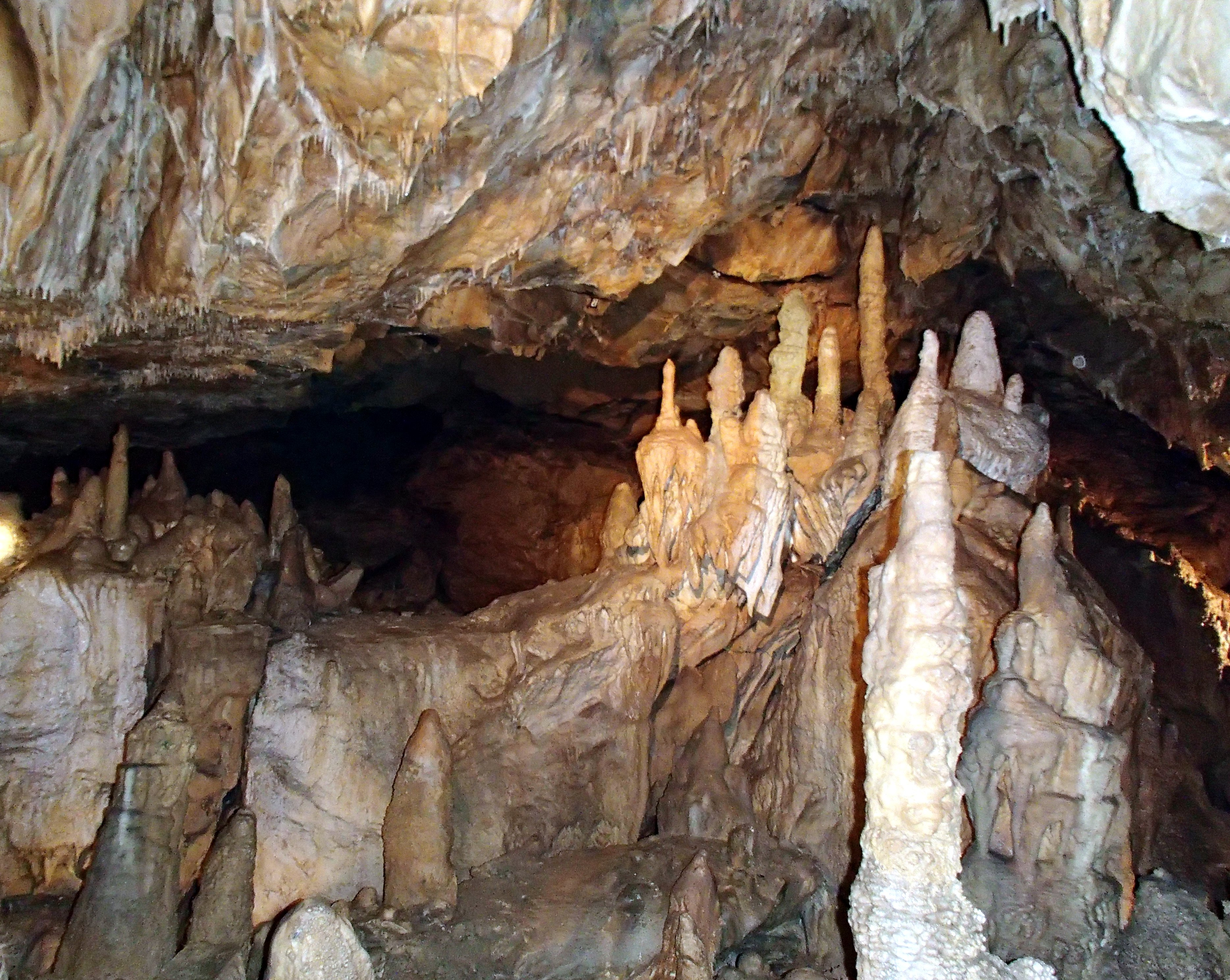 Krápníky v Mladečské jeskyni